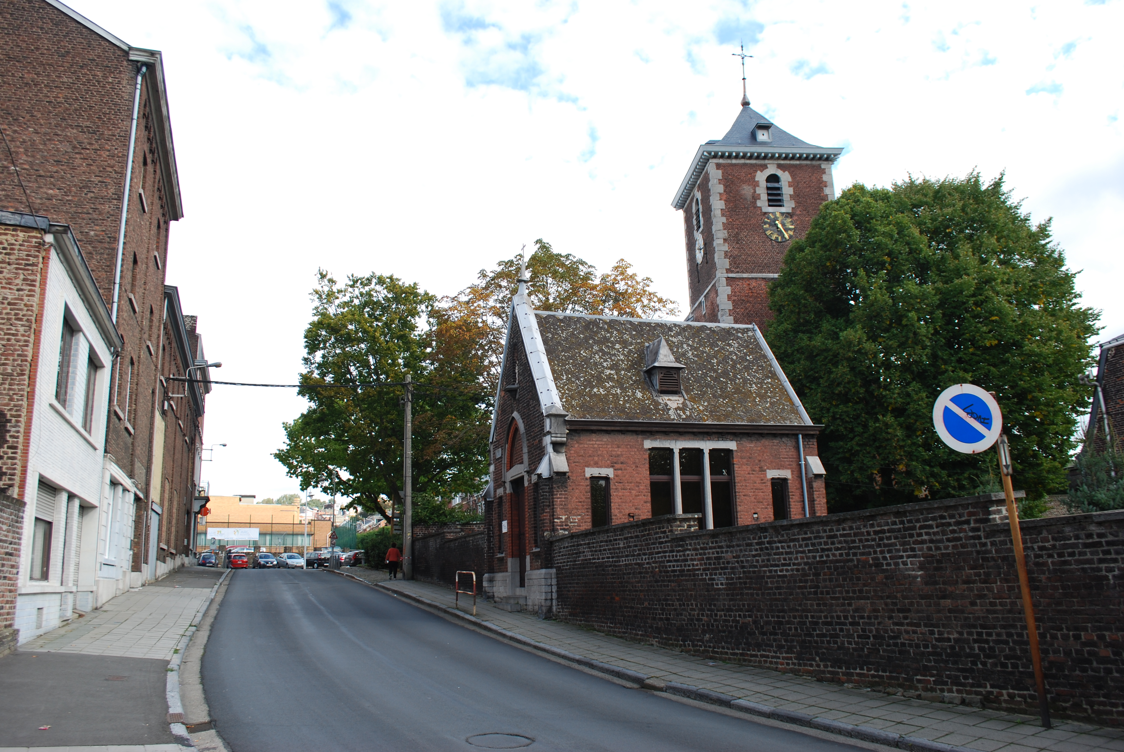 Vue de la rue du Presbytère à Chênée (Liège).